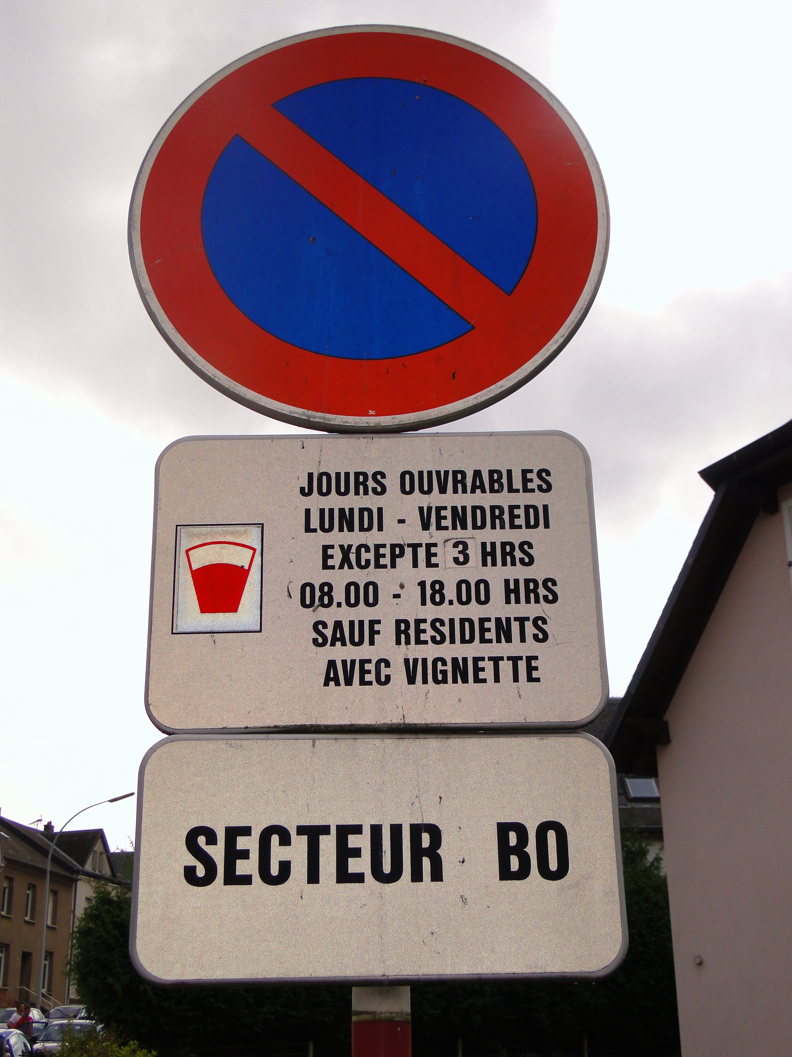 Verkéiersschëld C,18 aus dem Lëtzebuerger Code de la route mam Zousazschëld Modell 7b